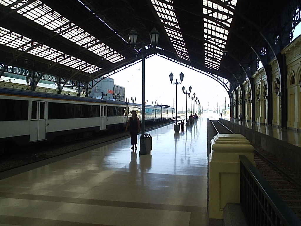 Estación Central (Interior) Autor:Alstradiaan Fecha:Diciembre de 2004 Fotografía tomada con una cámara digital Olympus camedia D-395 de 3.2 megapixeles Categoría:Chile (imagen)